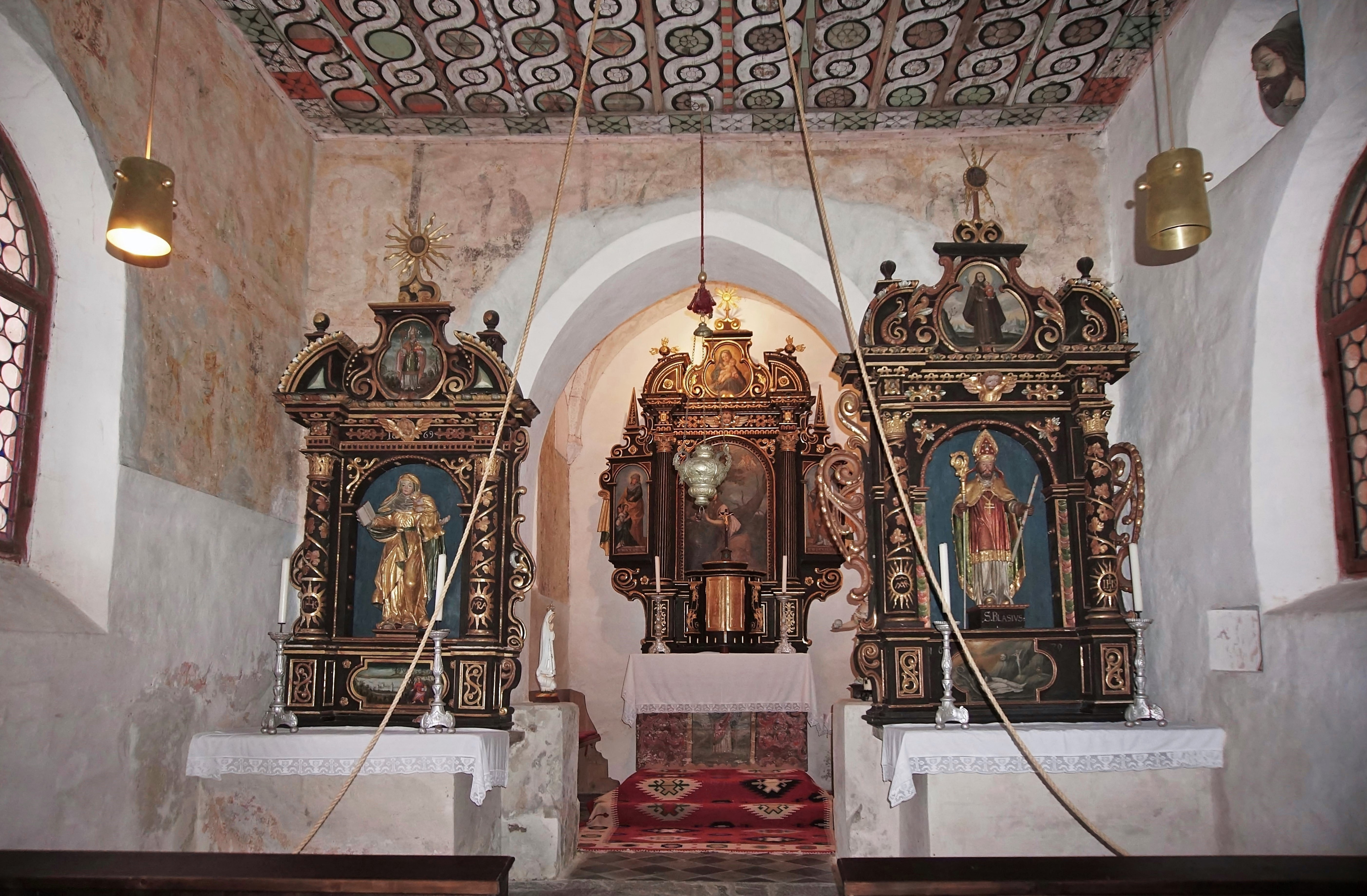 Kath. Filialkirche St. Magdalena (Weitensfeld), Innenansicht